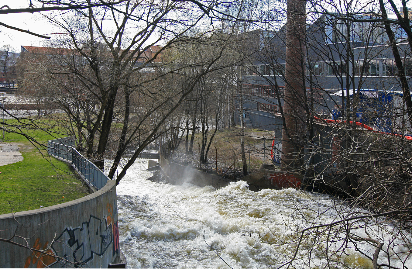 Akerselva i vårflom ved Nedre Foss